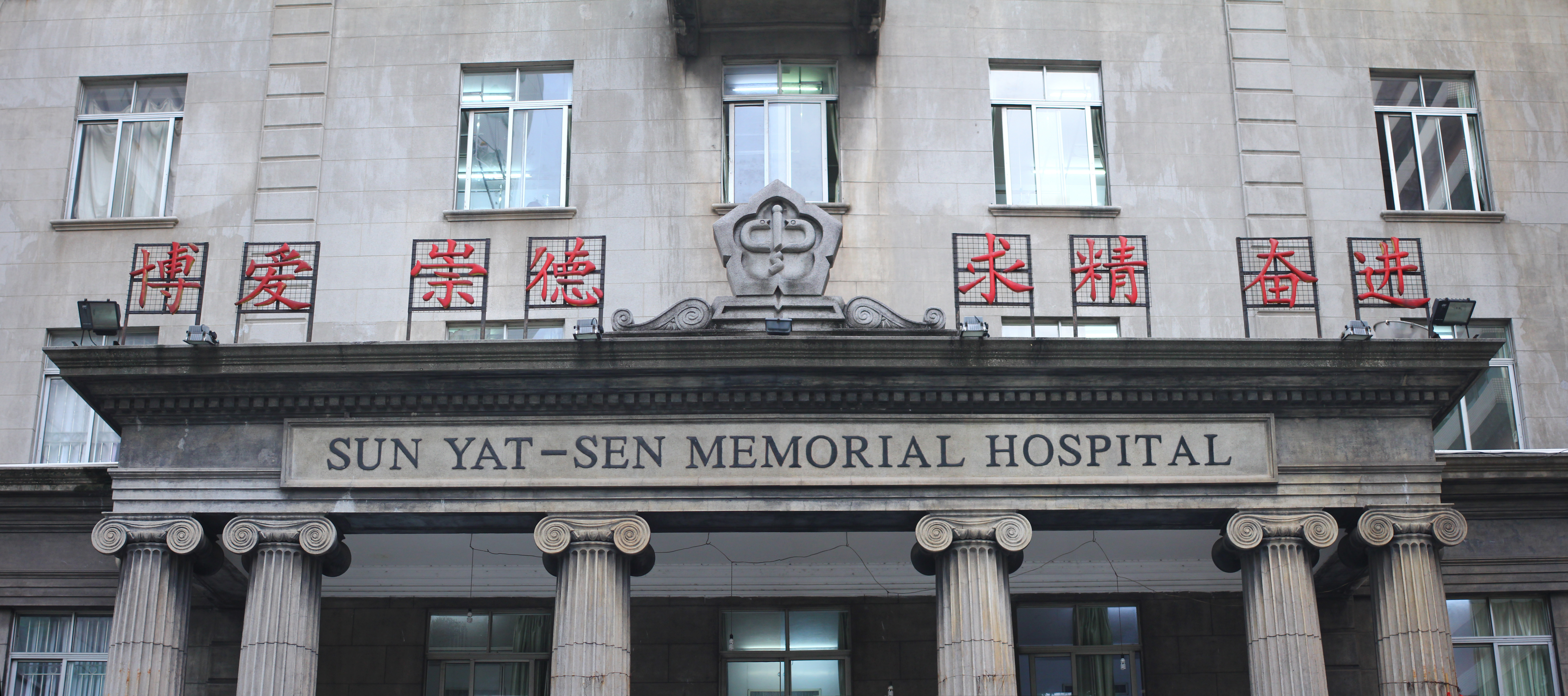 中山大學孫逸仙紀念醫院博濟樓正面。